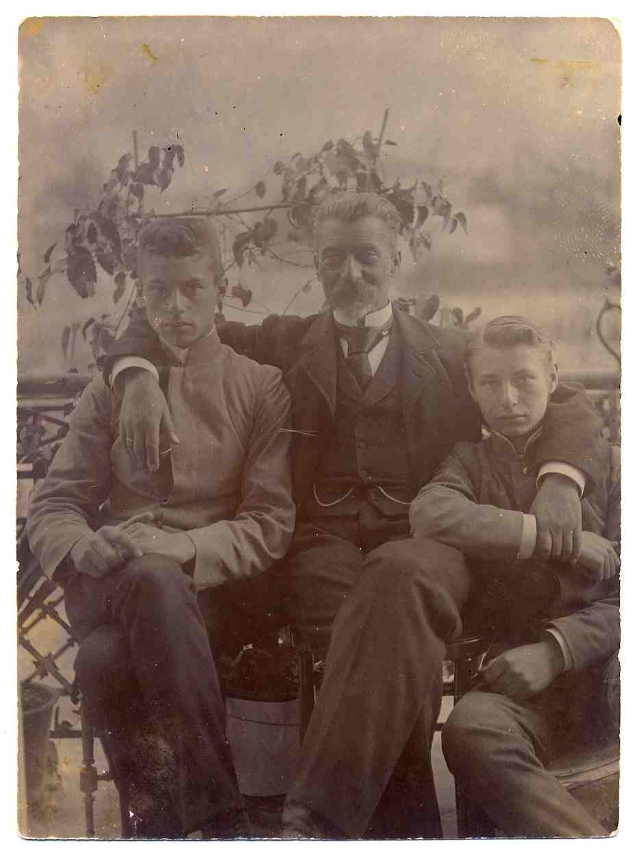 Файл наданий Затурцівським меморіальним музеєм В'ячеслава Липинського